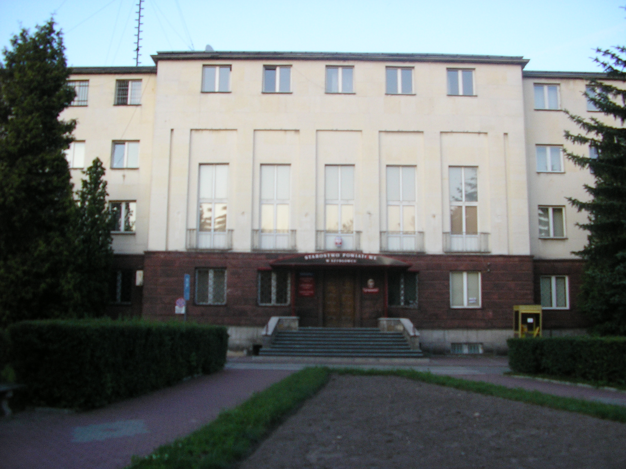 Starostwo Powiatowe w Szydłowcu